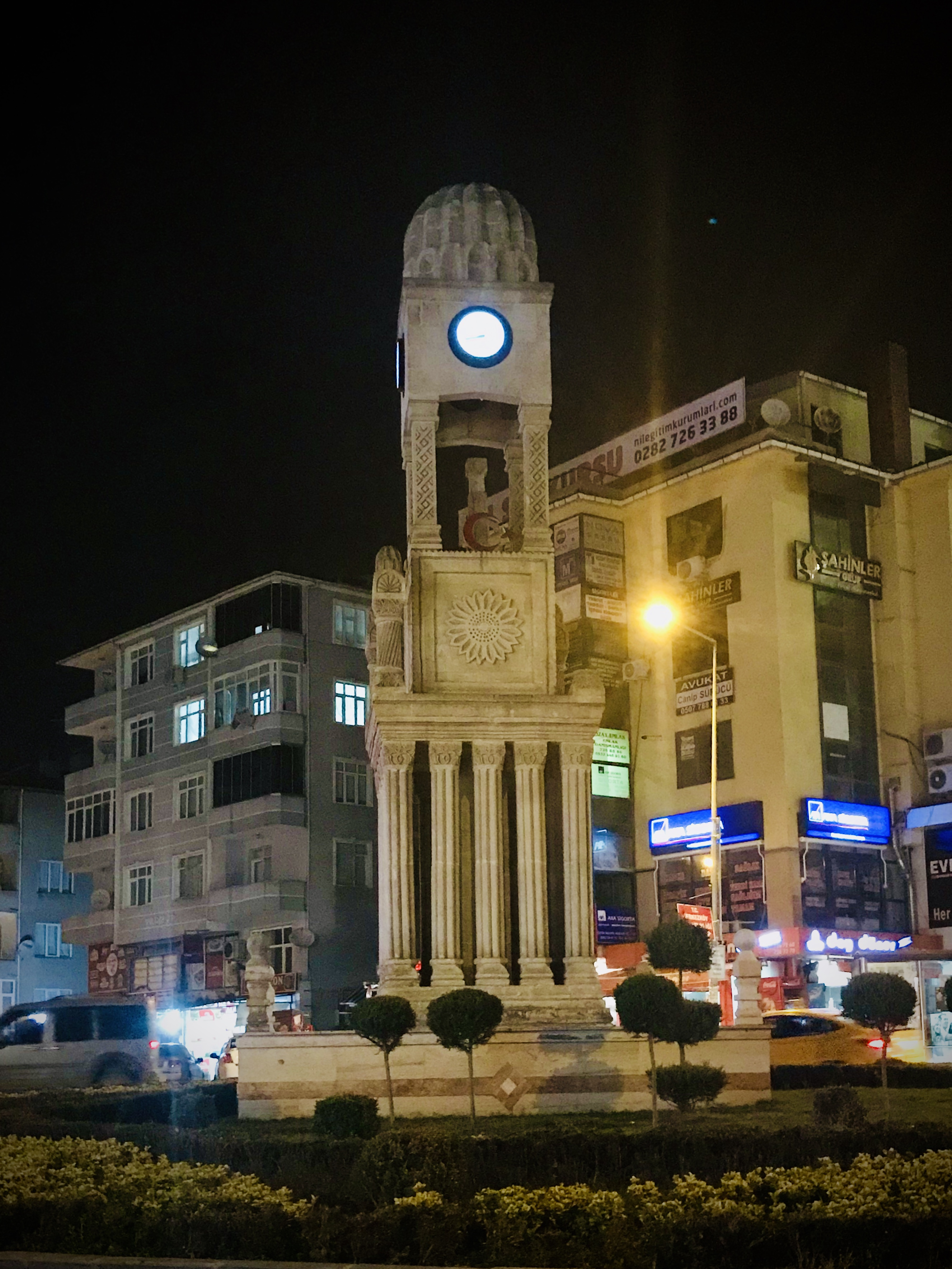 Çerkezköy